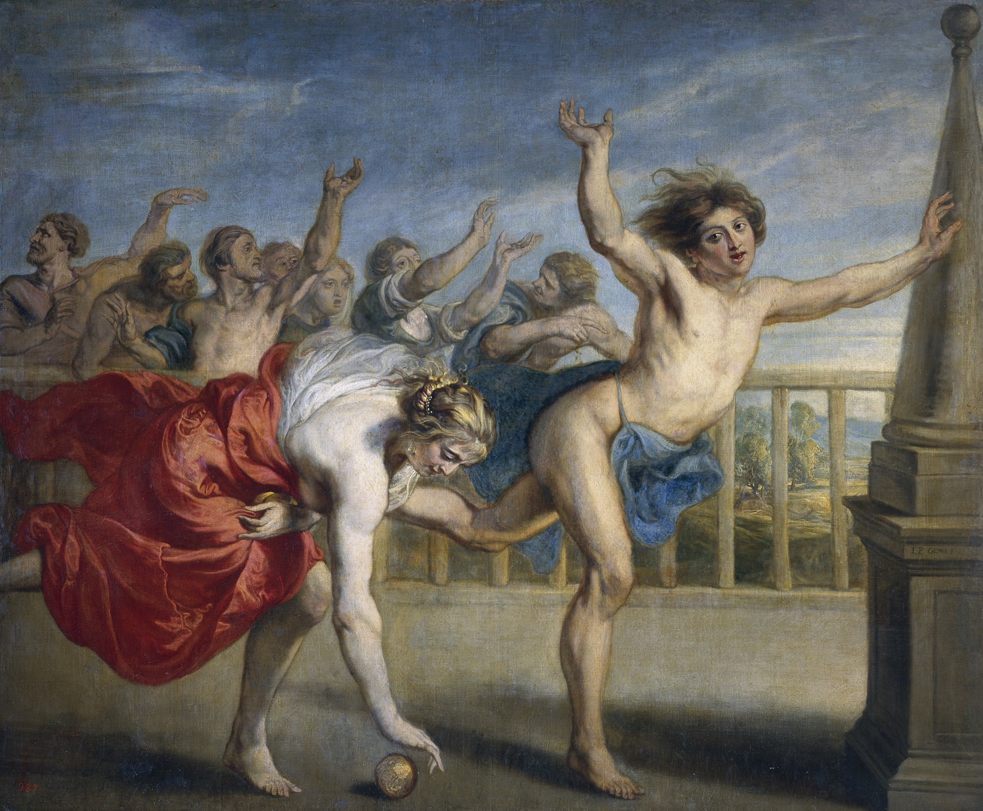 Hipómenes y Atalantalabel QS:Les,"Hipómenes y Atalanta"